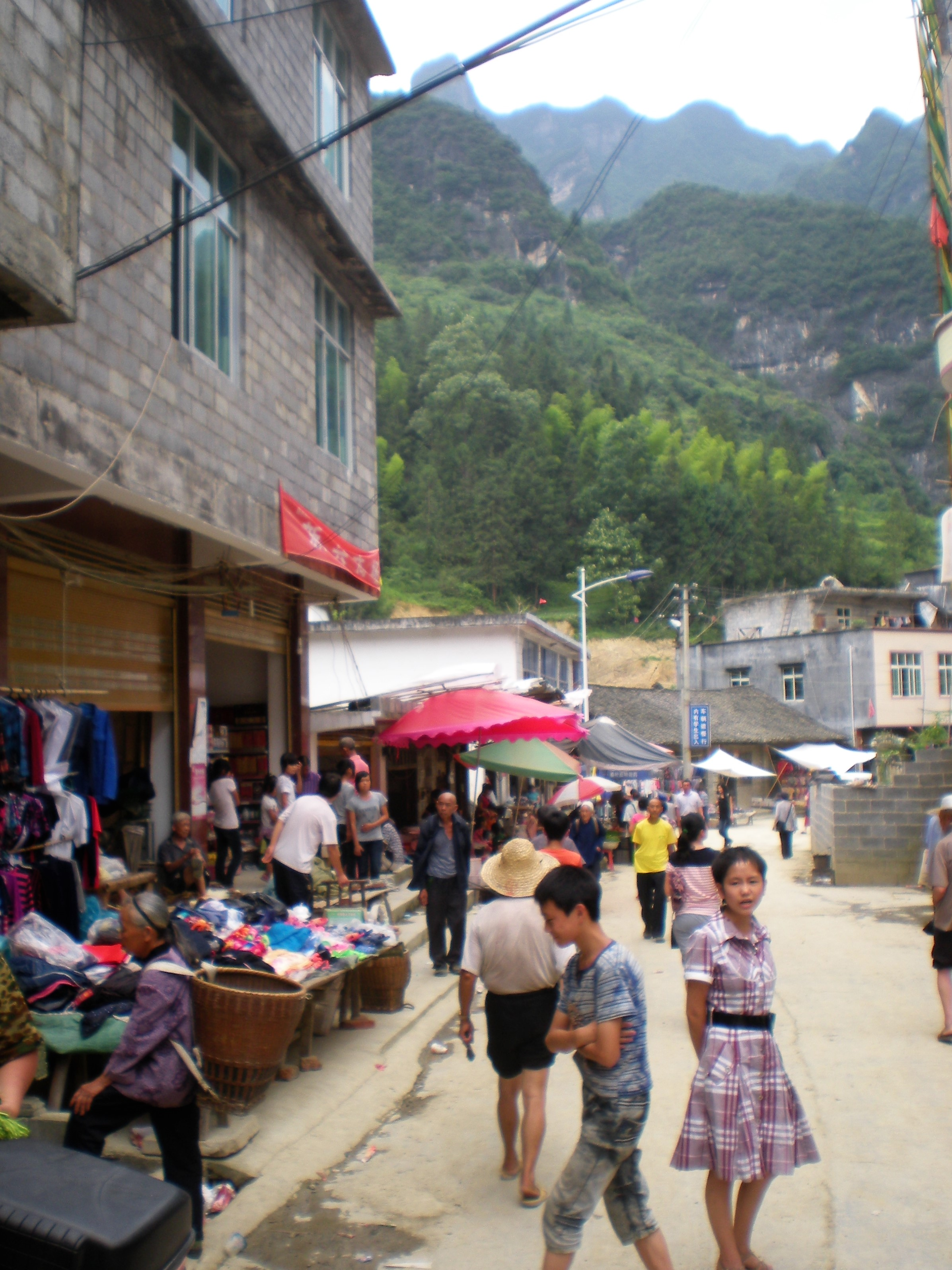 Main Street in Nanmu Township, Youyang , Youyang County, Chongqing